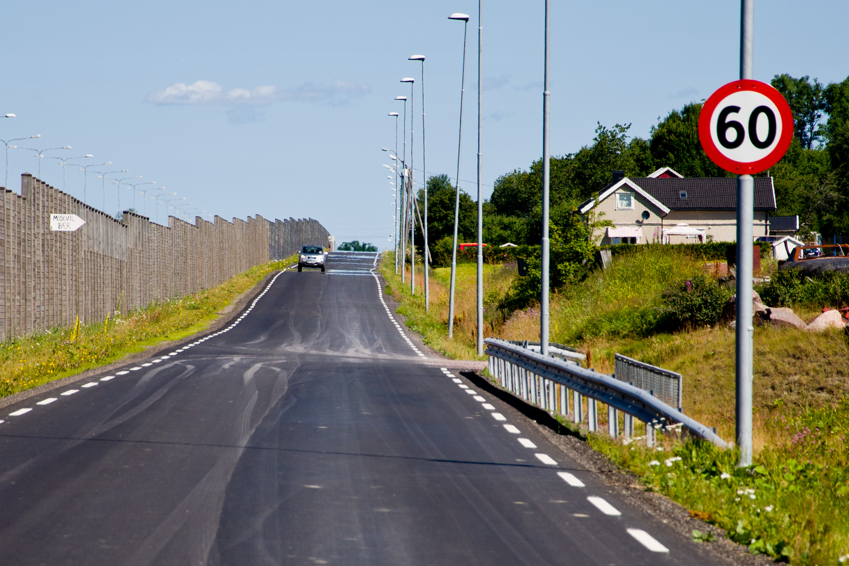 Fylkesvei 666 Moskvilveien i Horten, Vestfold